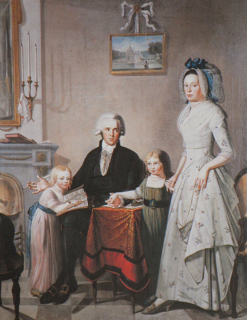 Familieportret H.L. Wijchgel van Lellens